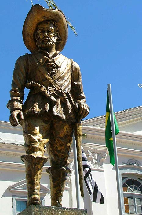 Baltasar Fernandes, bandeirante paulista fundador de Sorocaba e desbravador do Rio Grande do Sul.